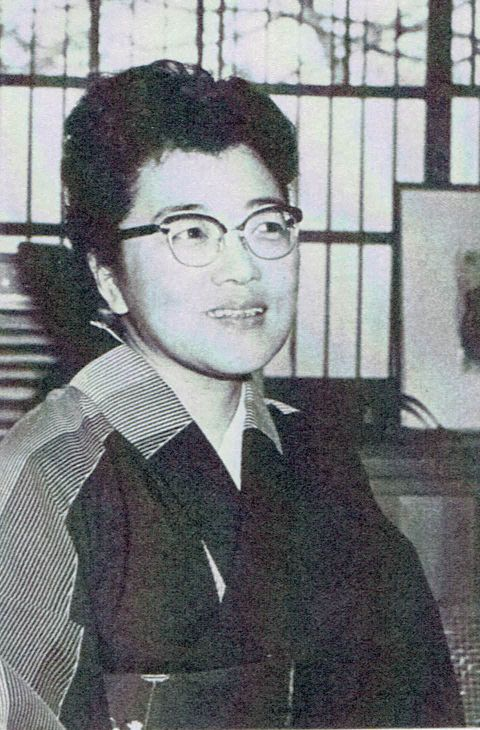 プリンス自動車販売『プリンス』第11巻第3号（1964）より渡辺喜恵子